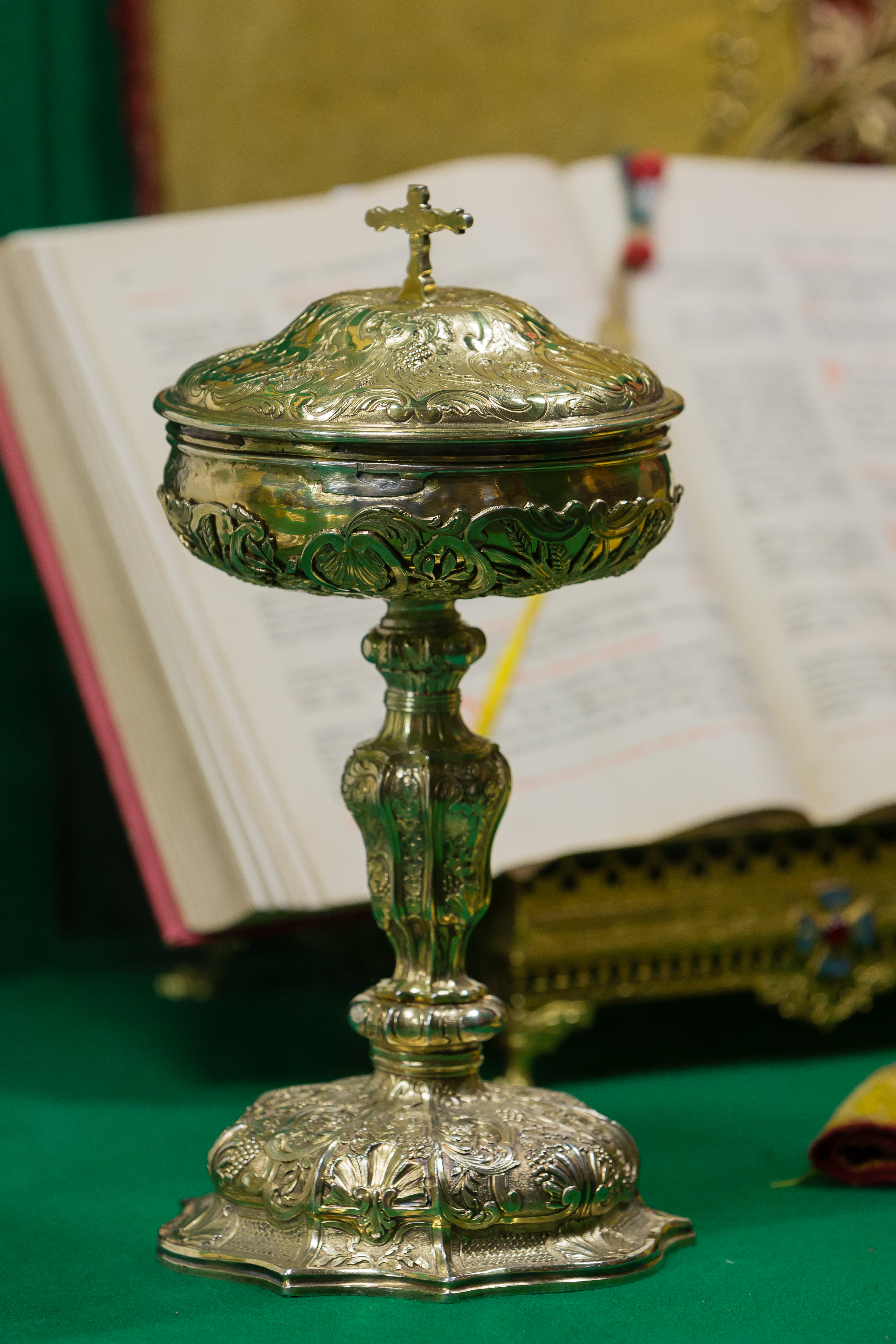 Ciboire dans l'église Saint-Suliau de Sizun (France).